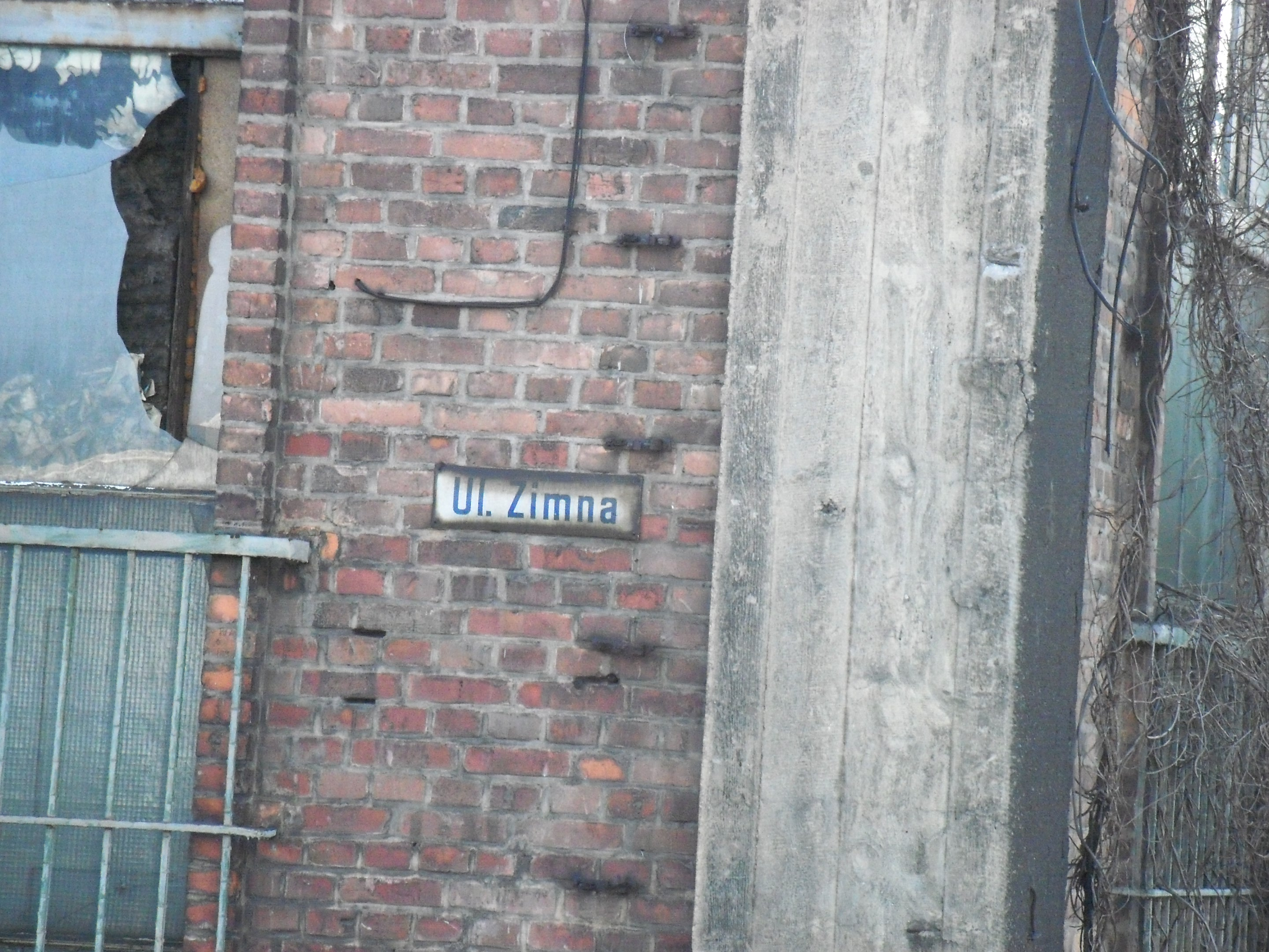 Huta Baildon w Katowicach - tabliczka z dawną nazwą jednej z zakładowych ulic (ul. Zimna)